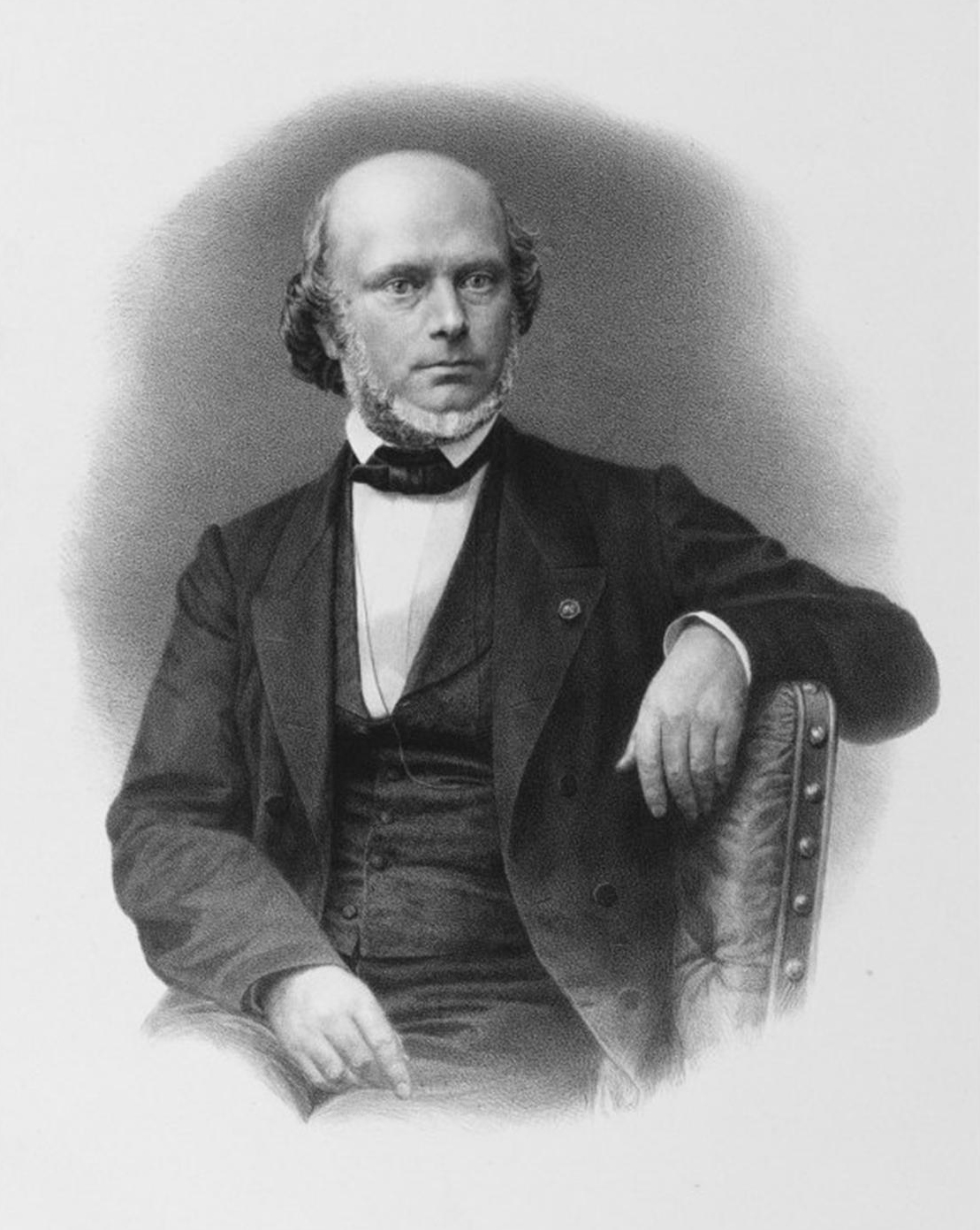 French naturalist Jean Louis Armand de Quatrefages de Bréau (1810-1892)